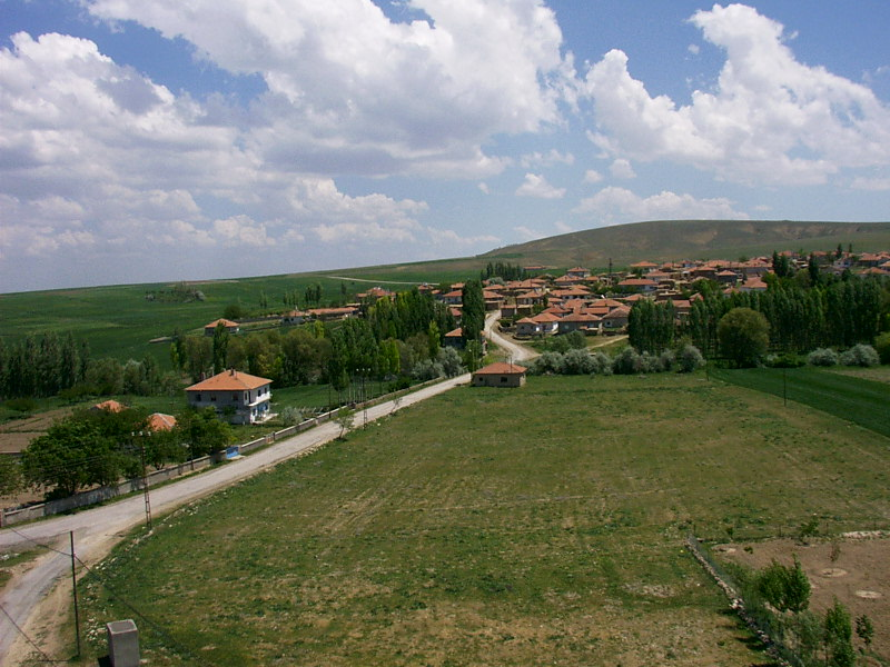 Köşektaş köyü Hacıbektaş, Nevşehir